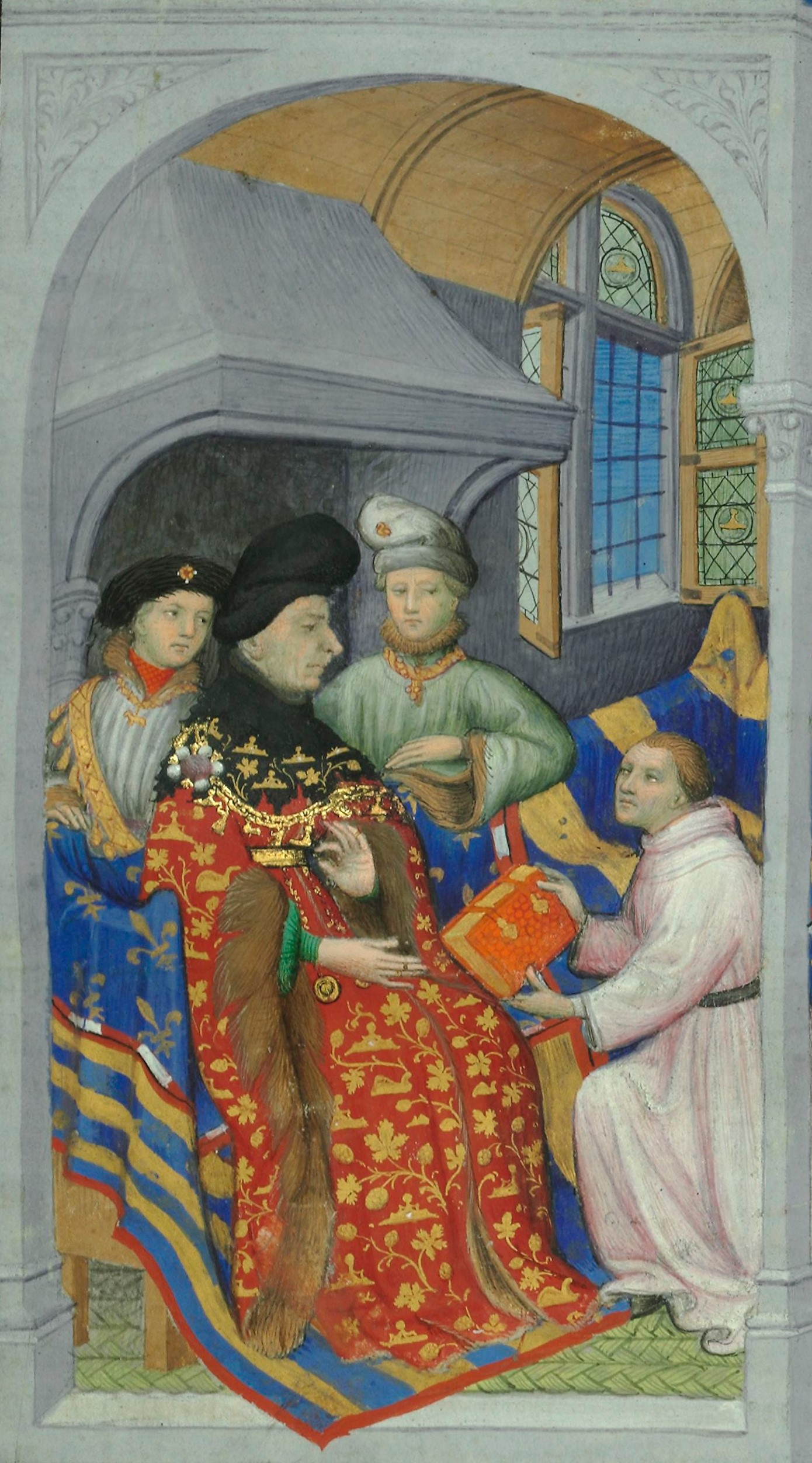 Herzog Johann ohne Furcht von Burgund inmitten seiner Familie